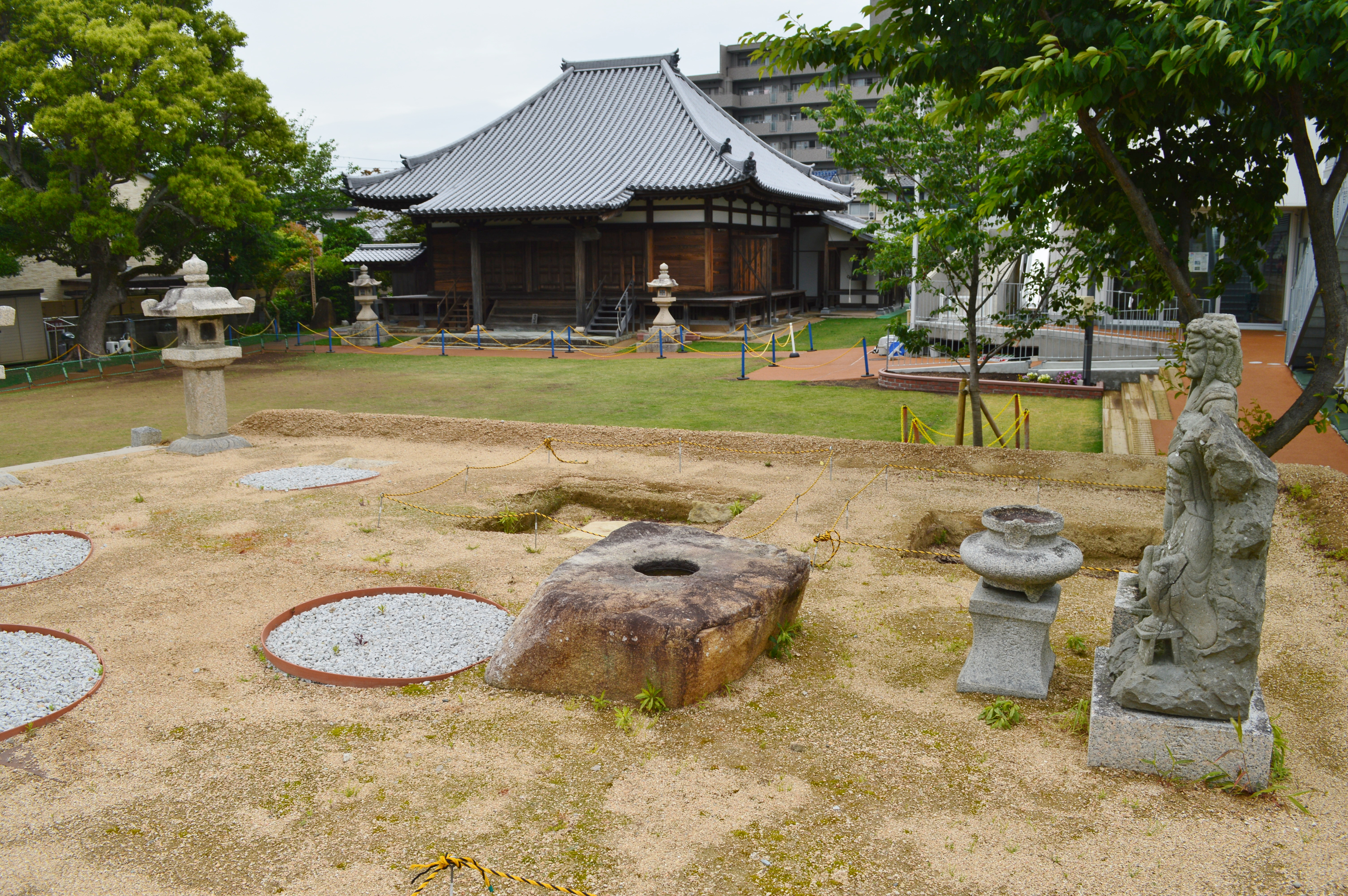 太寺廃寺塔跡と高家寺本堂 Nikon D3200